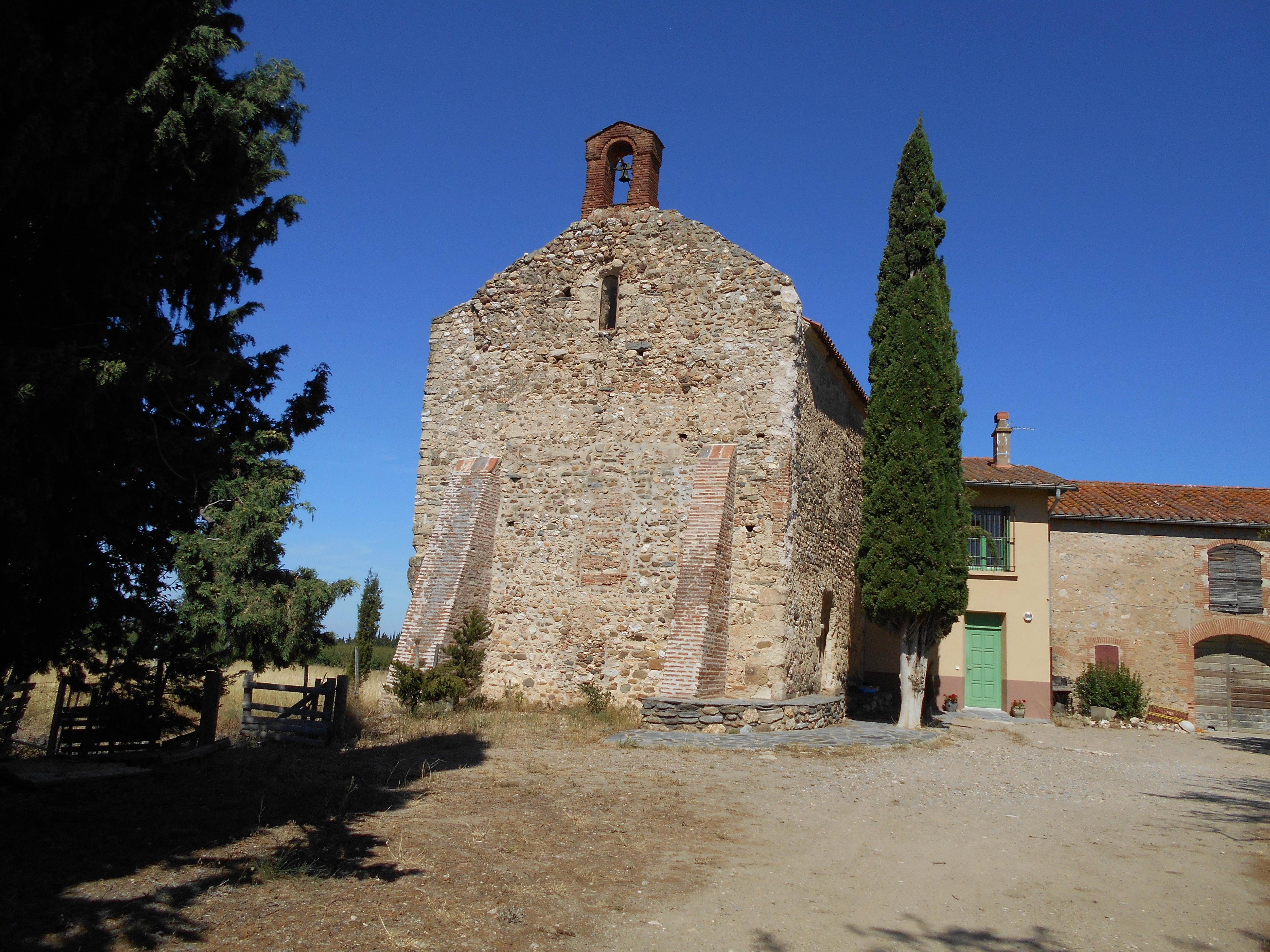 Façana oest.